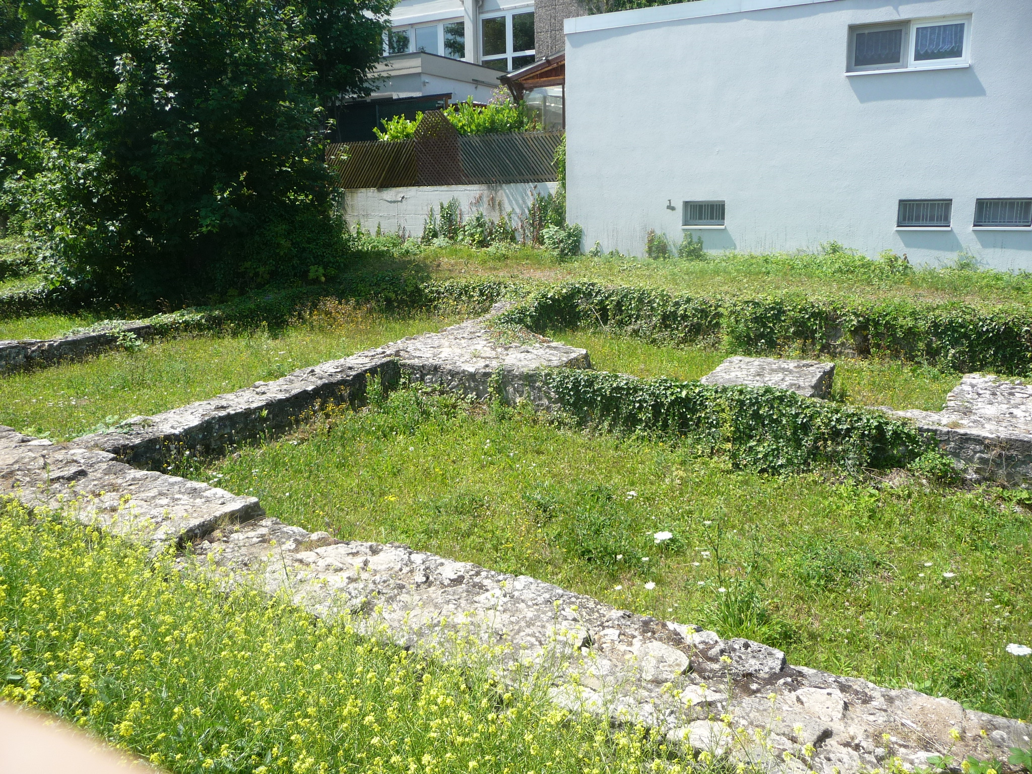 Alzey, Rheinland-Pfalz